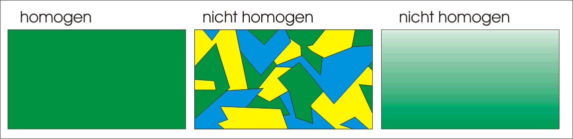 Schematische Darstellung von homogenen und nicht homogenen Flächen